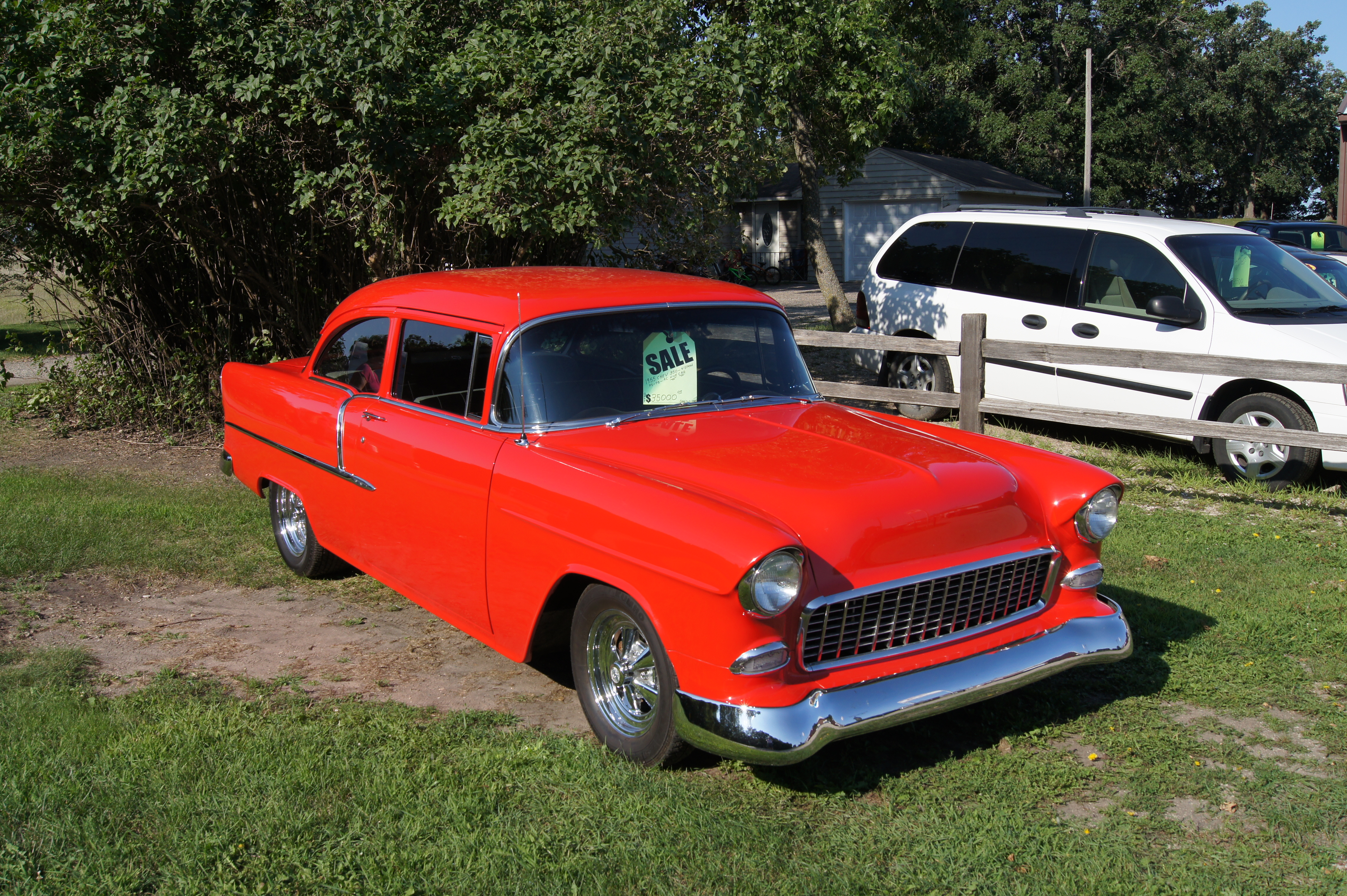 55 Chevrolet 210?